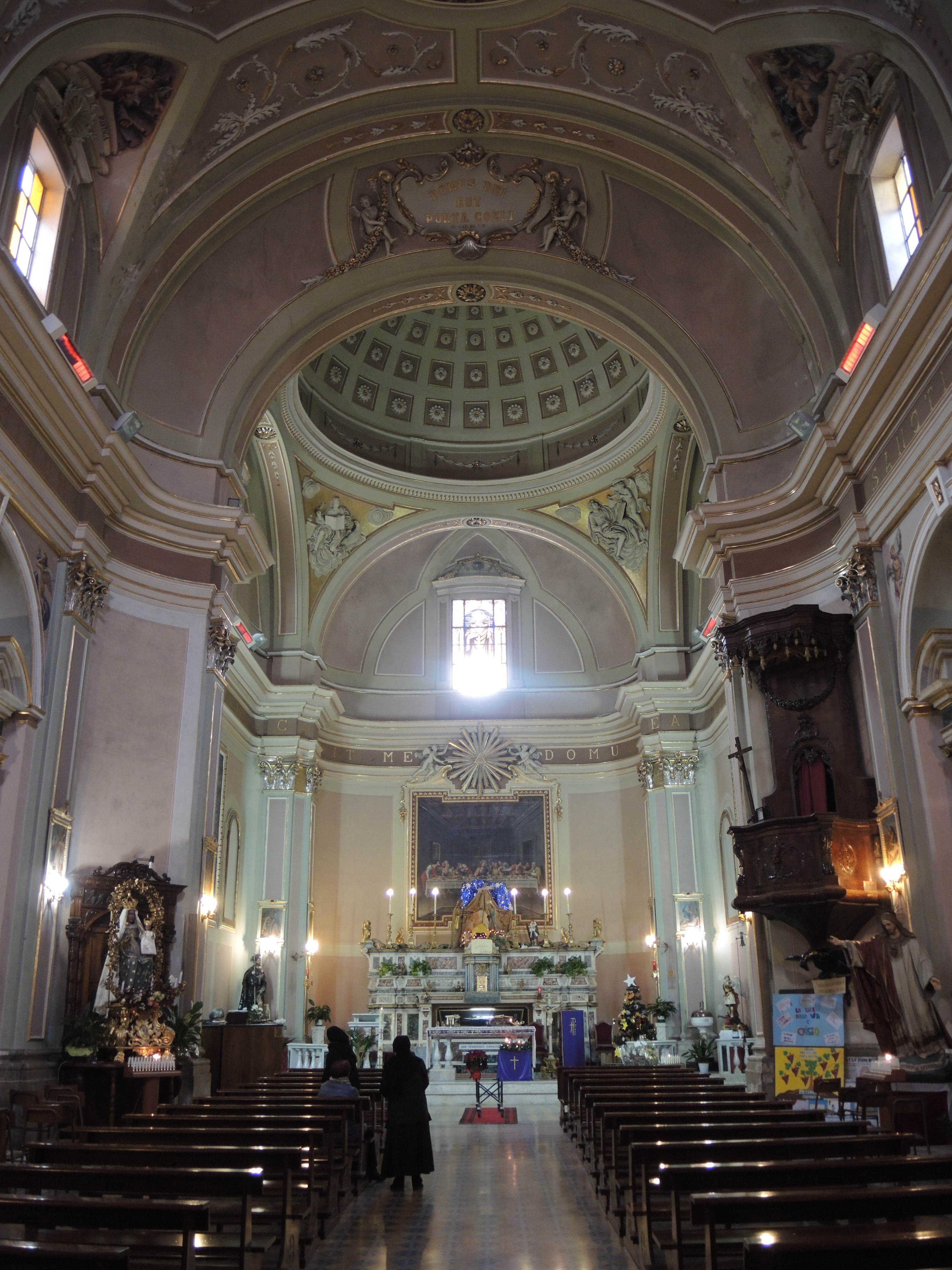 Villa Santa Maria: Chiesa di San Nicola di Bari